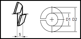 DIN 74361